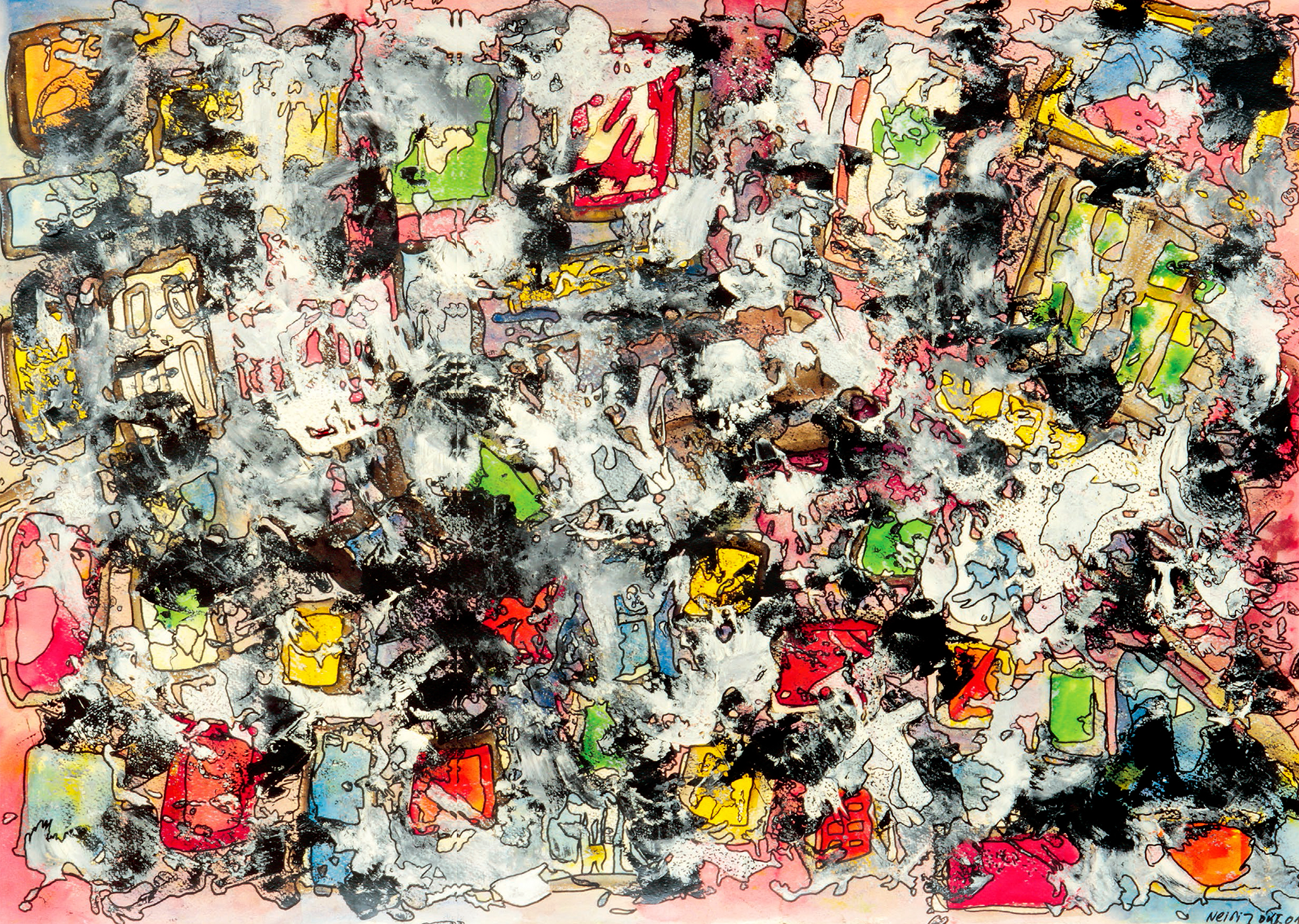 Mixed media on light cardboard